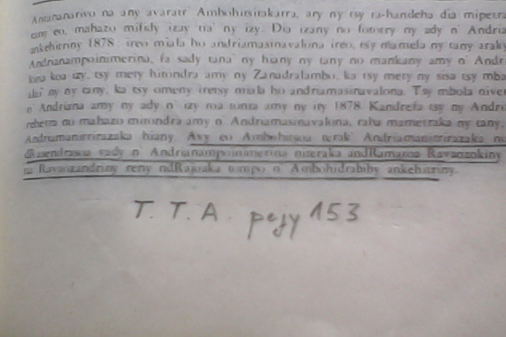 Rasendrasoa,Tantara ny Andriana page 153.